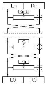 Сеть Фейстеля(расшифрование)